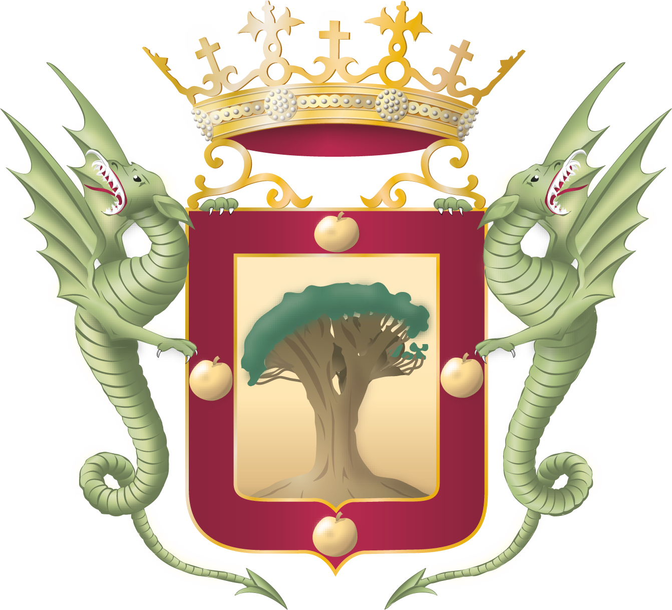 Escudo Heráldico Institucional de la Villa de La Orotava